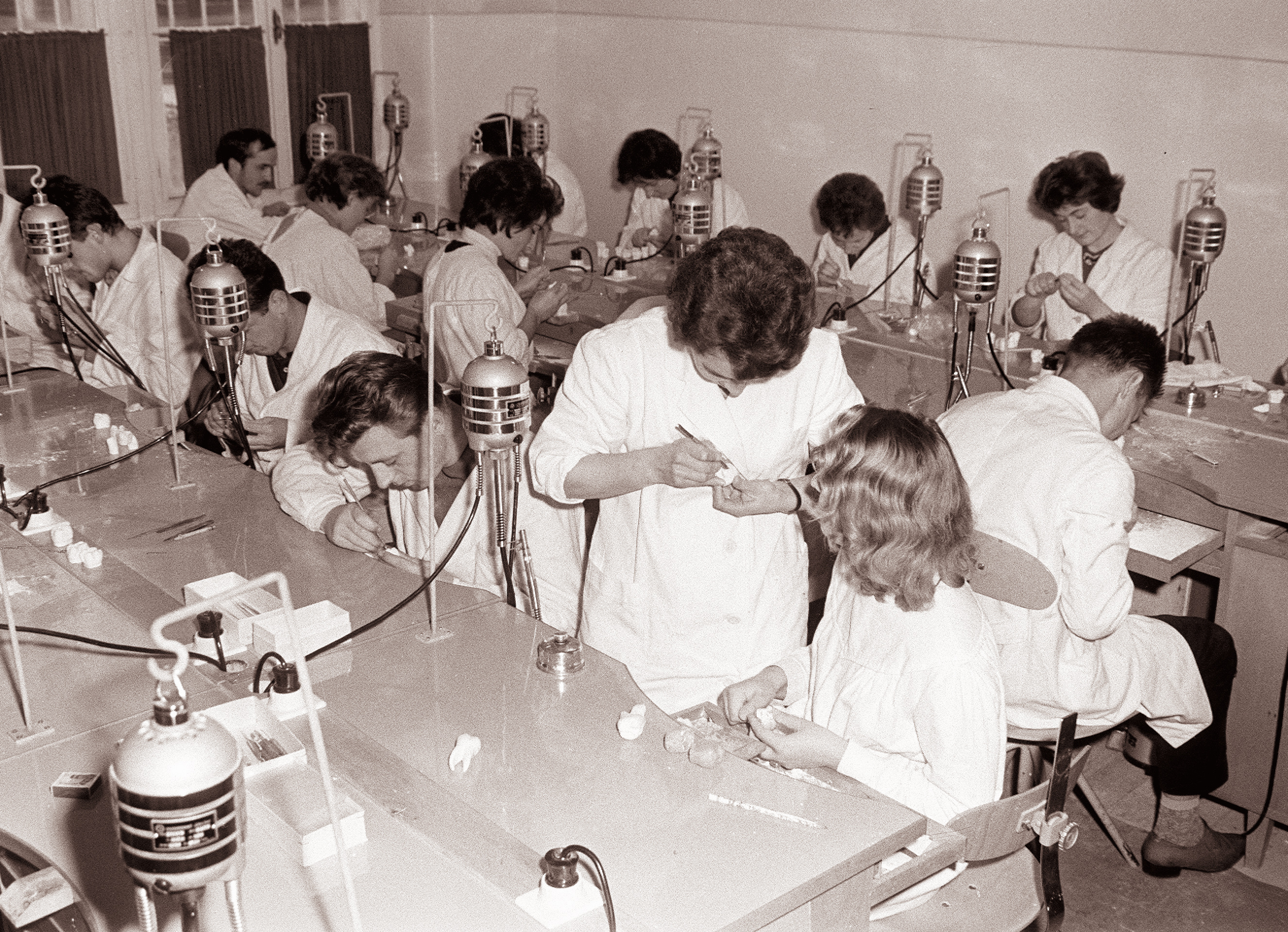 Praktične vaje slušateljev višje stomatološke šole v Mariboru v predkliničnem laboratoriju